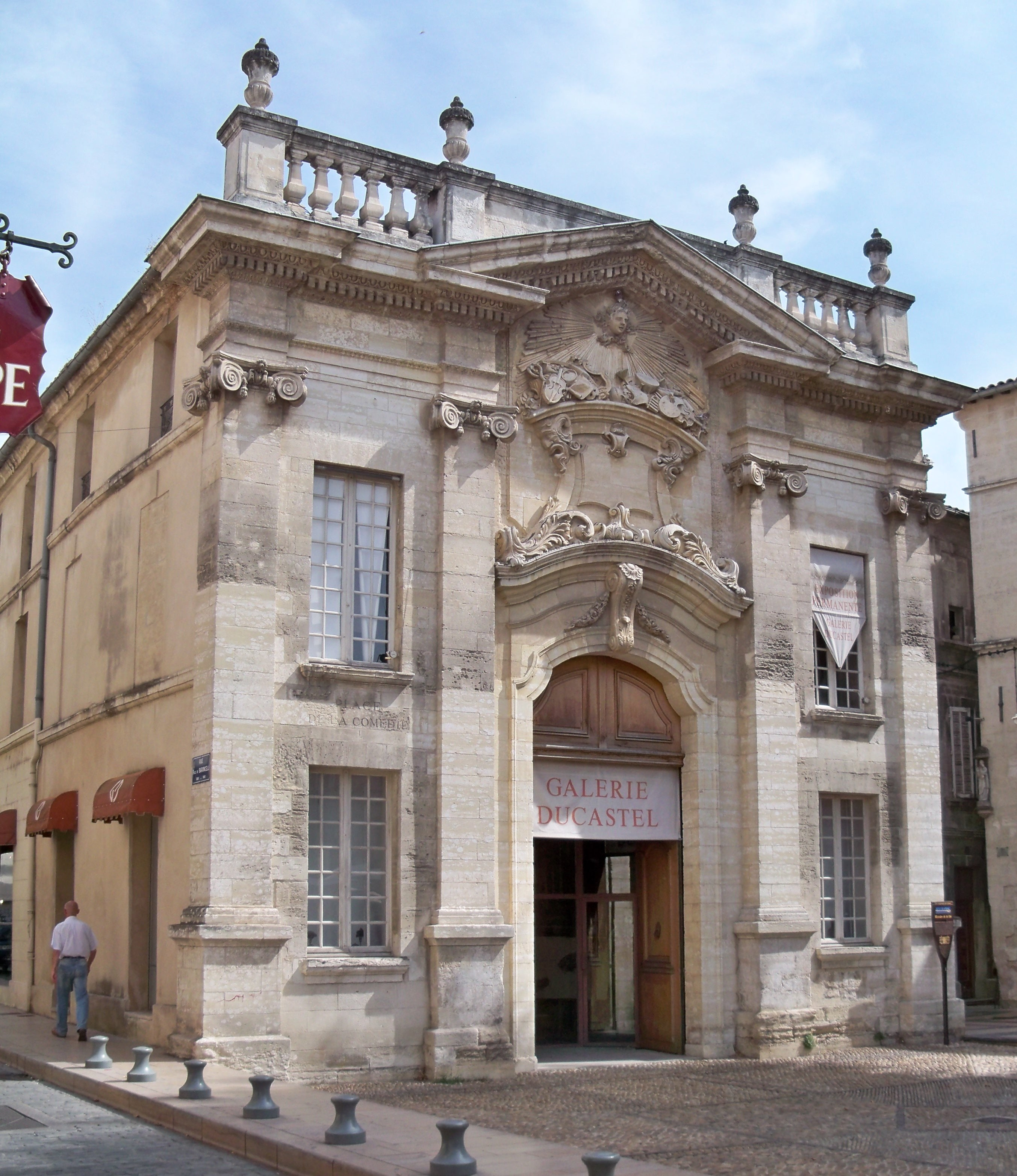 Première salle de spectacle d'Avignon, du XVème siècle.